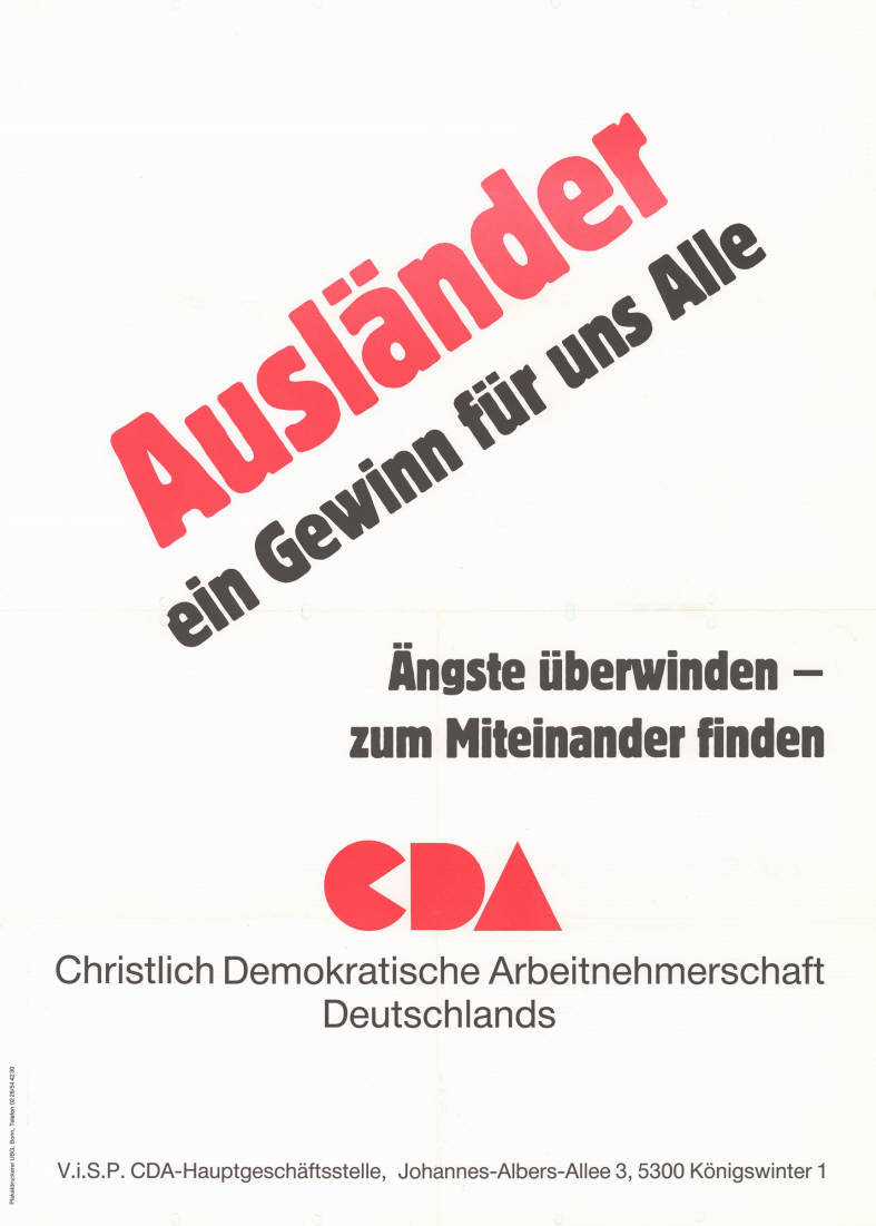 Ausländer ein Gewinn für uns Alle Ängste überwinden - zum Miteinander finden CDA ... Plakatart: Textplakat Allgemein Auftraggeber: V.i.S.P.: CDA-Hauptgeschäftsstelle, Königswinter Drucker_Druckart_Druckort: Plakatdruckerei UBG, Bonn Objekt-Signatur: 10-031 : 11514 Bestand: CDU-Plakate (10-031) GliederungBestand10-18: CDU-Plakate (10-031) » CDA Lizenz: KAS/ACDP 10-031 : 11514 CC-BY-SA 3.0 DE